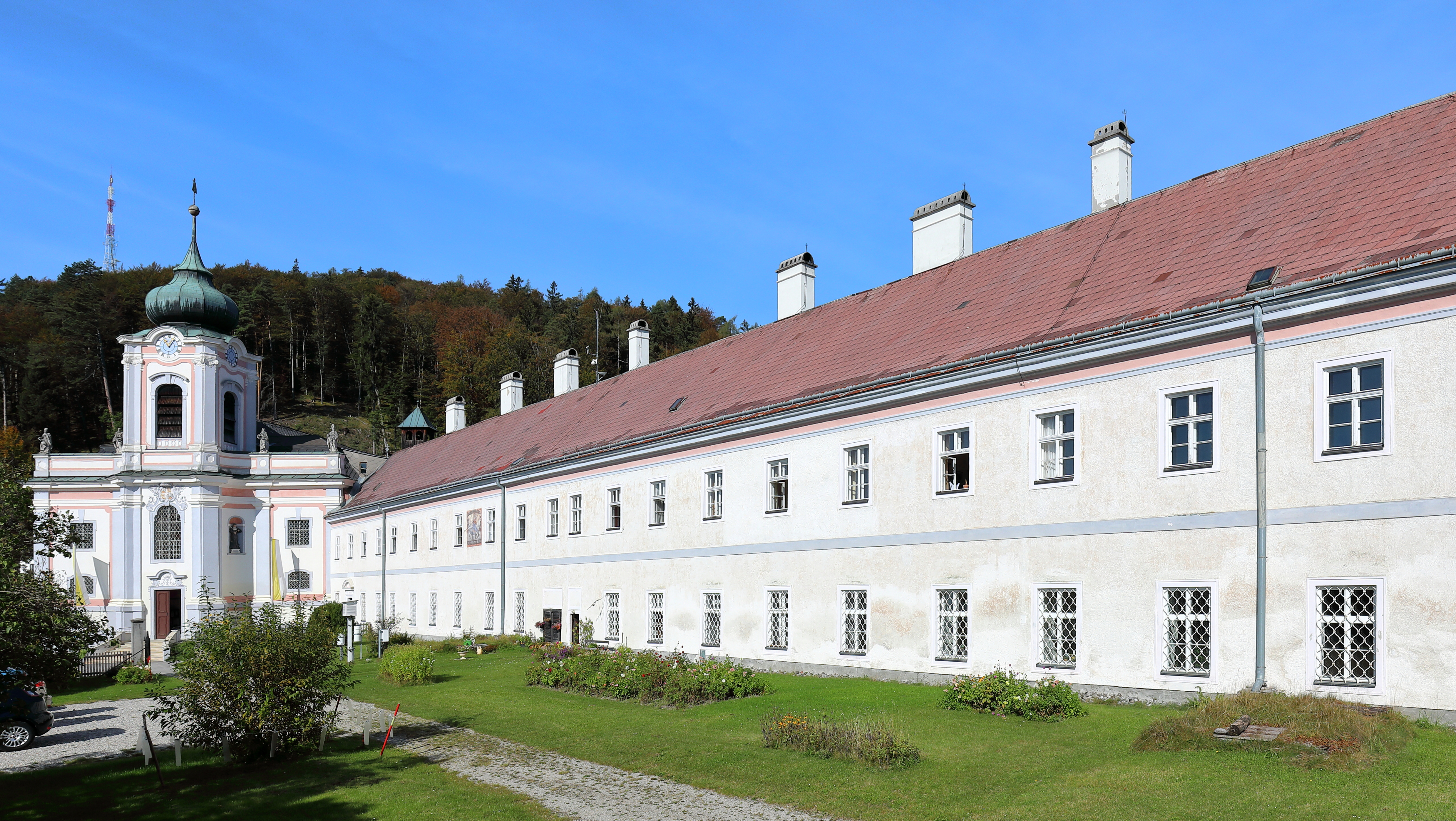 Die Südfront des Serviten-Klostergebäudes in Mariahilfberg, ein Weiler und Wallfahrtsort in der niederösterreichischen Marktgemeinde Gutenstein. Links die Kloster- und Wallfahrtskirche und dahinter der Sender Gutenstein-Residenzberg.Nachdem Johann Balthasar II., Graf von Hoyos, 1672 den Serviten die Betreuung der Wallfahrtskirche übertrug, stiftete er ihnen das Kloster. Diese ließen von 1679 bis 1685 im stumpfen Winkel an die Vorhalle der Wallfahrtskirche einen langgestreckten, zweigeschossigen Bau durch den Maurermeister Peter Baron und dem Zimmermeister Mathias Nietl errichten. 1724 wurde das Klostergebäude um vier Fensterachsen erweitert.